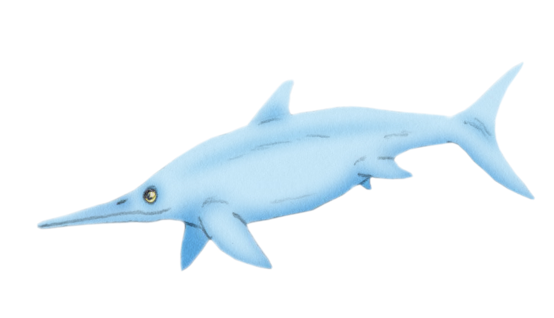 Restoration of Chacaicosaurus